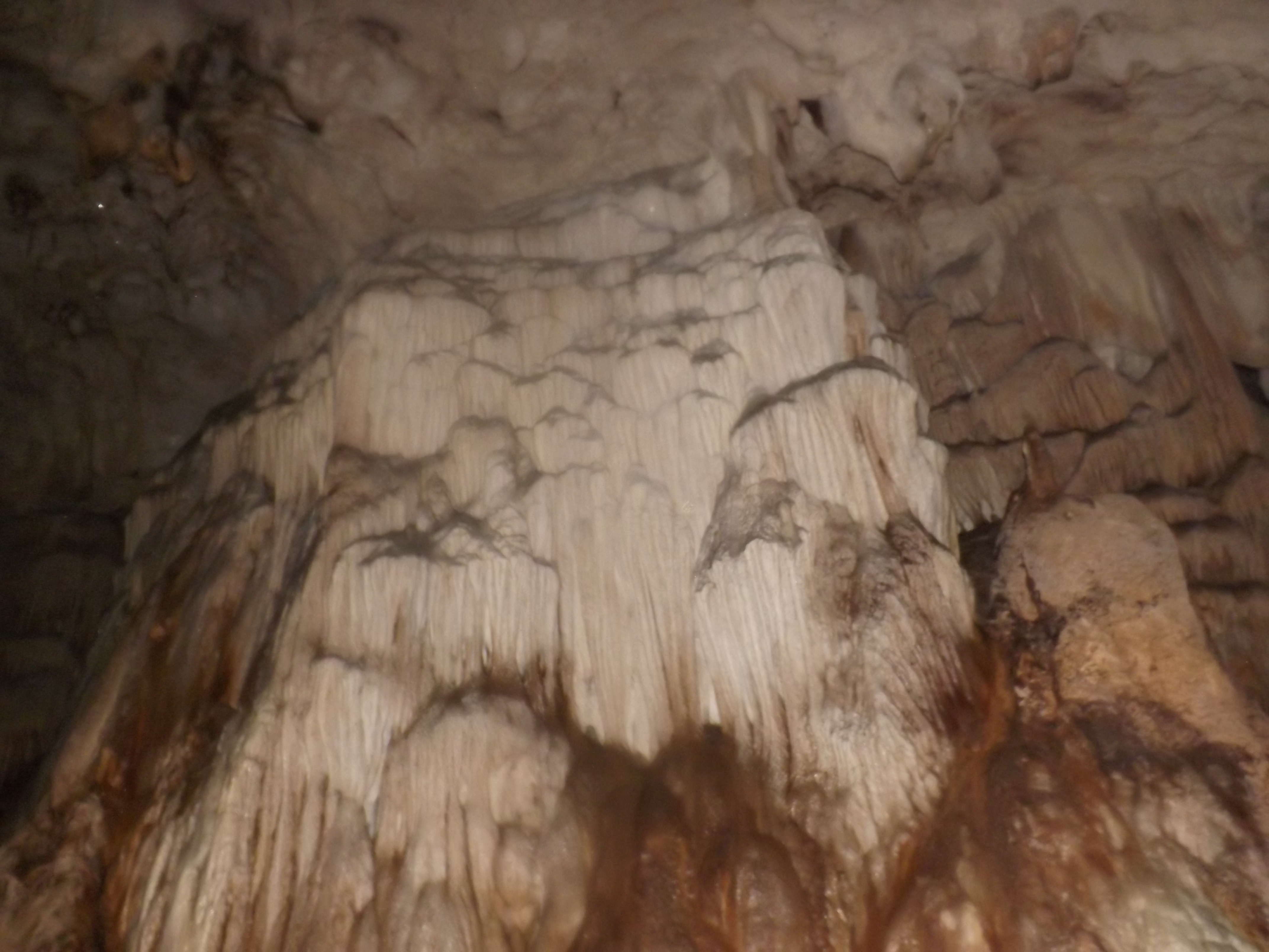 Shpella e Pëllumbasit